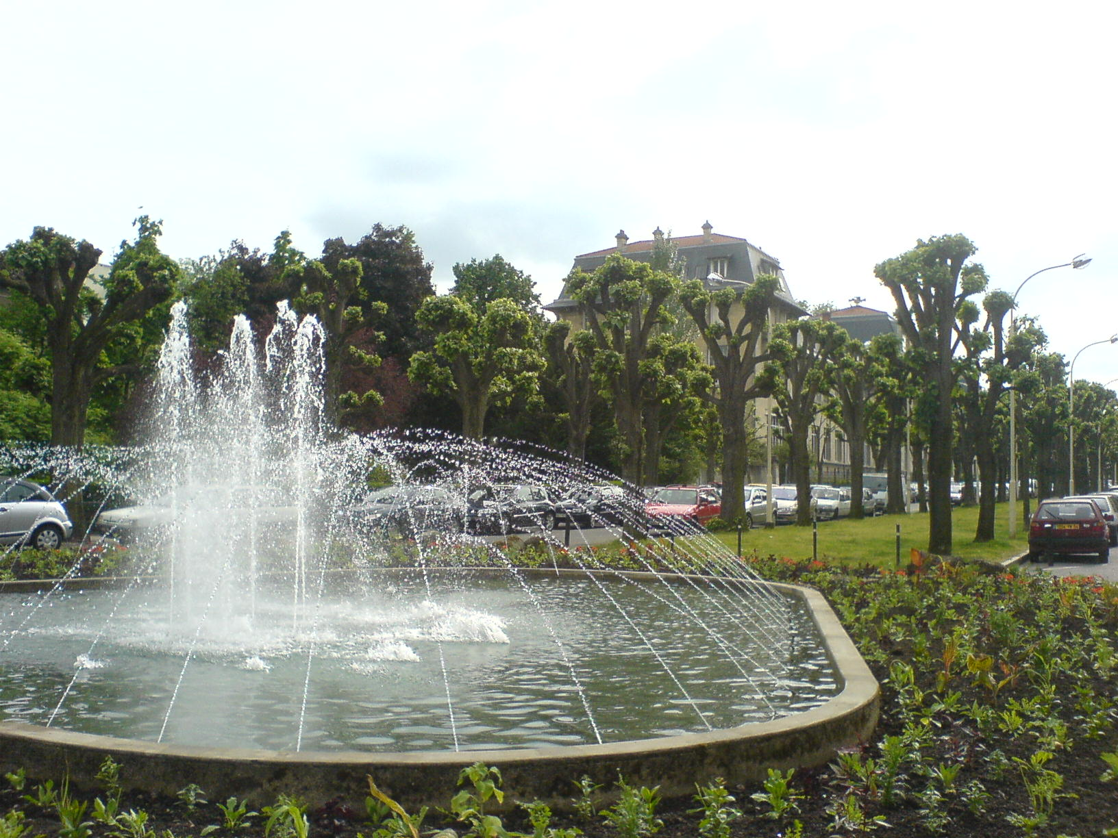 plaza en nancy